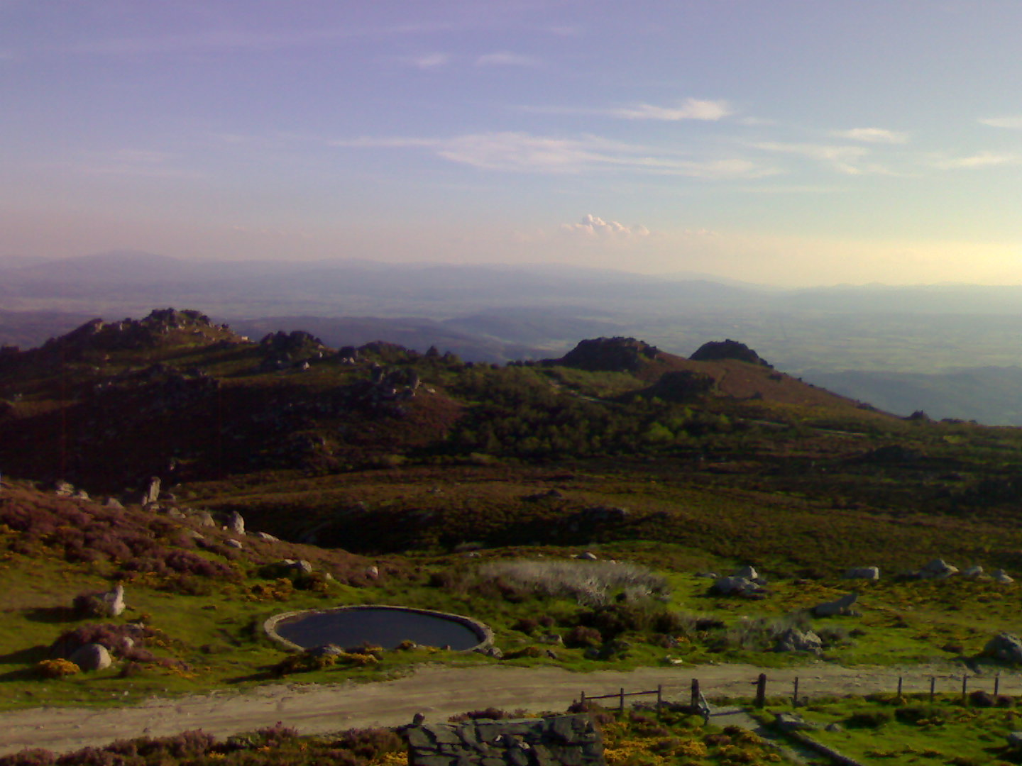 O estanque da serra